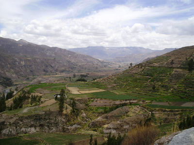 Colca es un destino turistico del Perú.